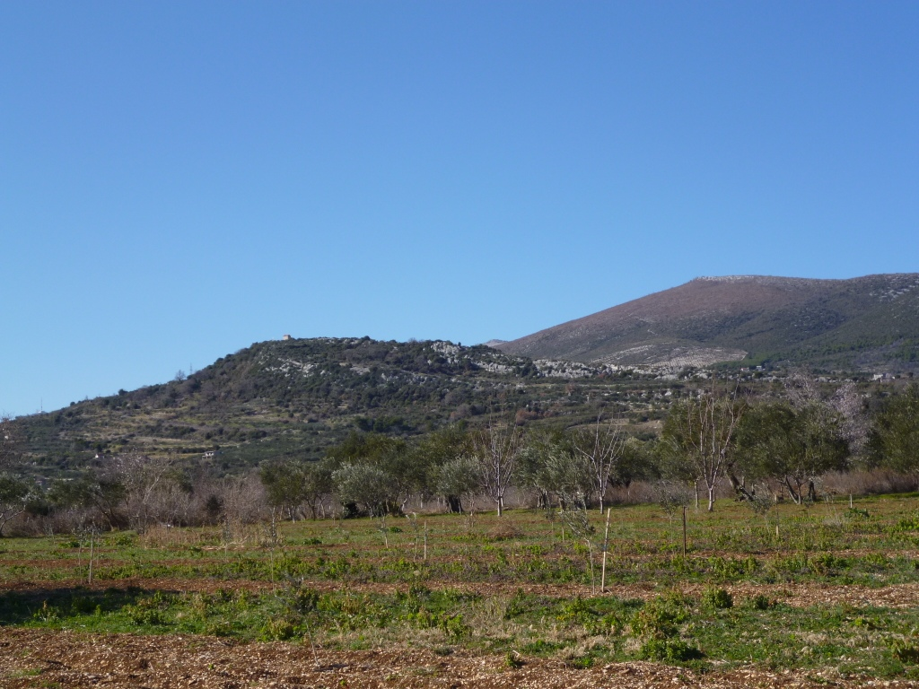 Bijaći, Kaštel Štafilić, crkva sv. Onofrije